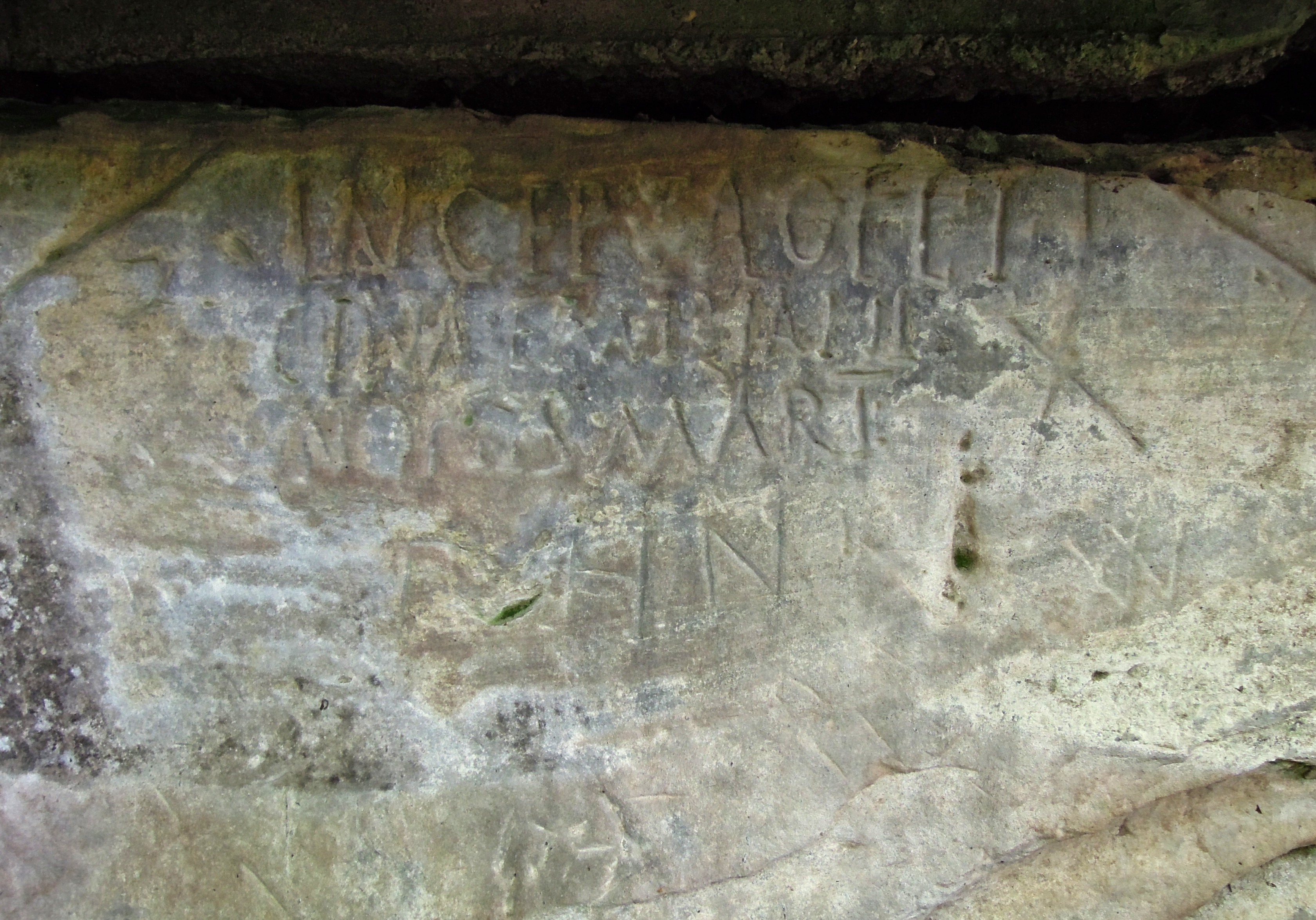 Inschrift am Emilianusstollen in St. Barbara; CIL XIII 4238